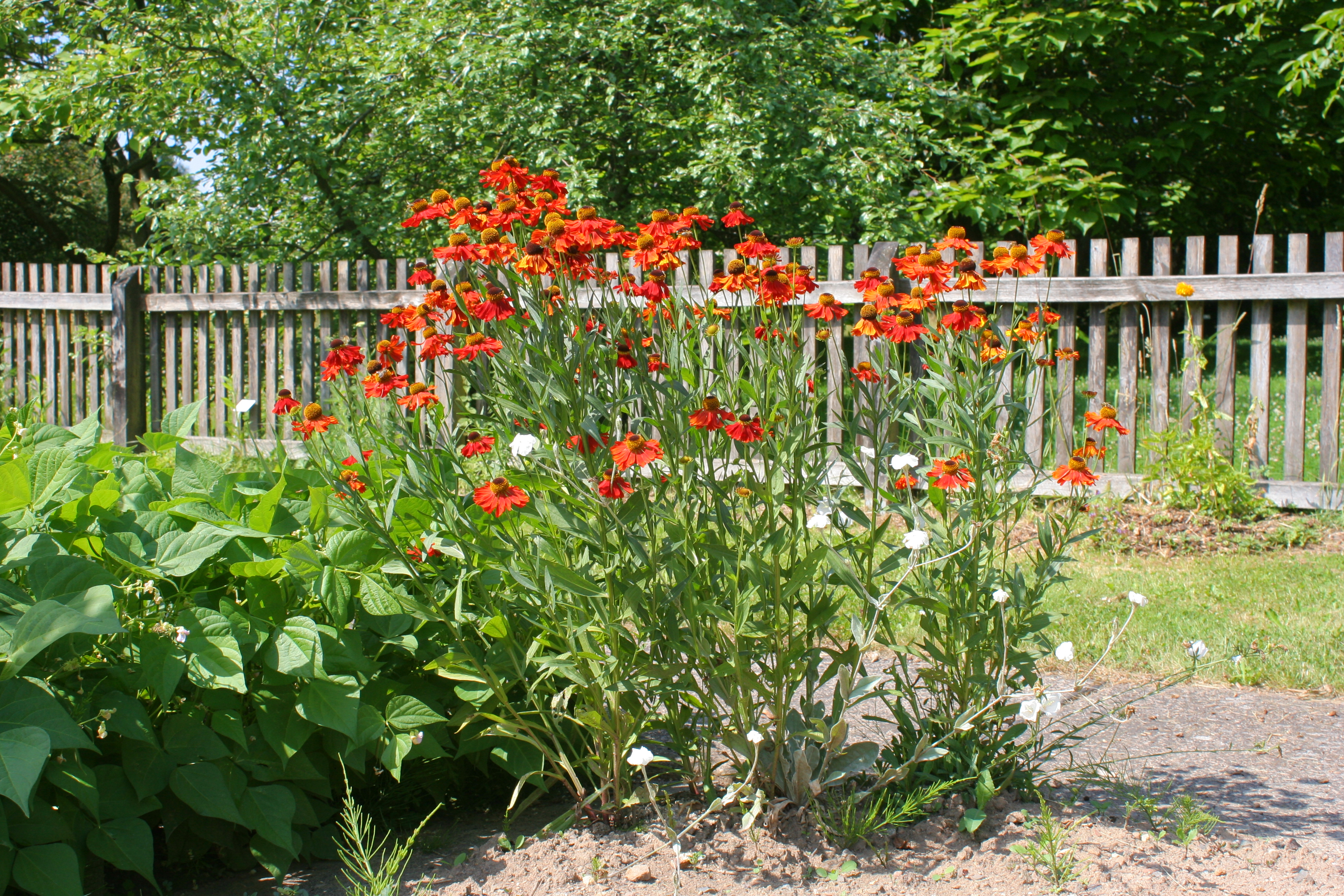 Helenium x hybridum, Zuchtform, wahrscheinlich die beliebte „Moerheim Beauty“; Botanischer Garten Marburg